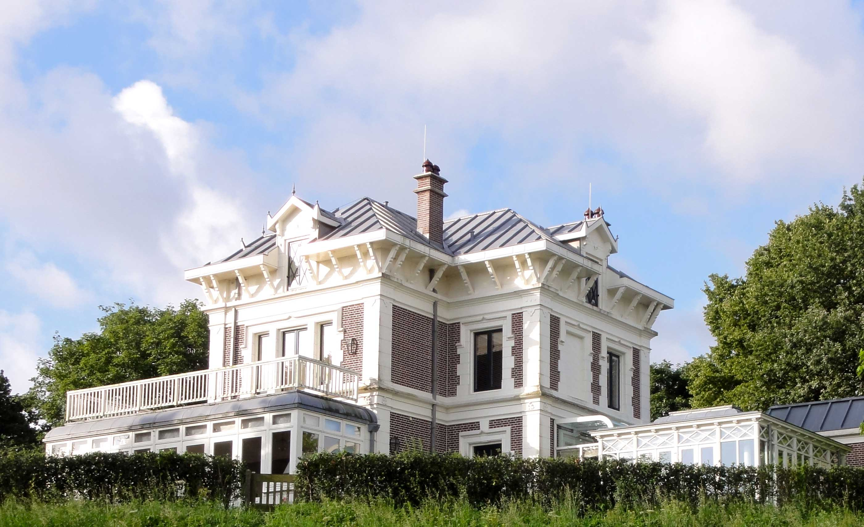 Flevorama op de klifkust van Muiderberg